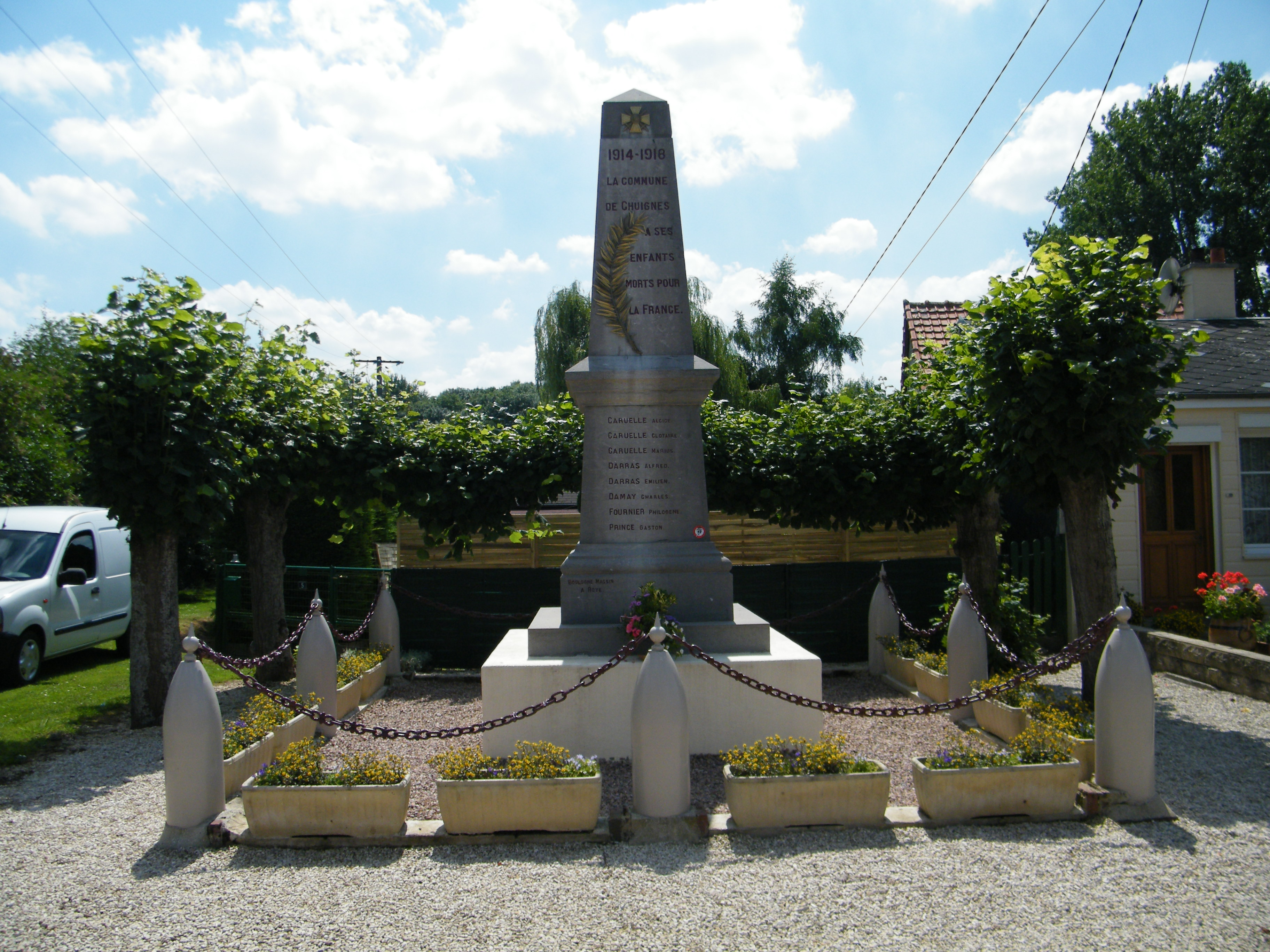 Monument aux morts pour la patrie.